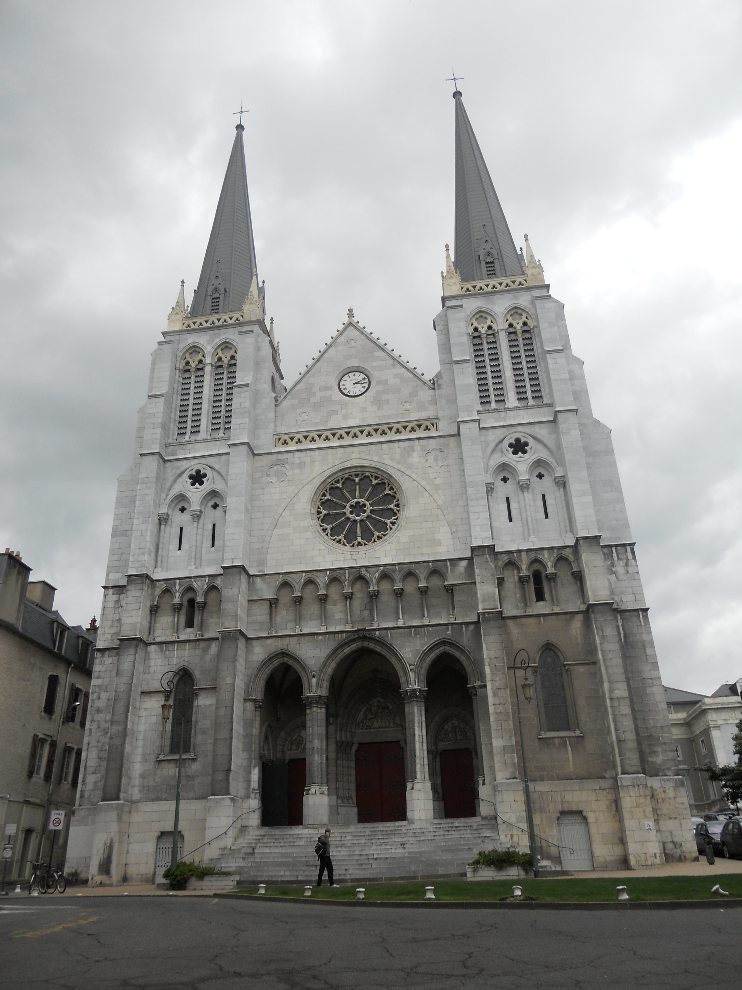 Eglise saint Jacques de Pau après le rajout des deux flèches